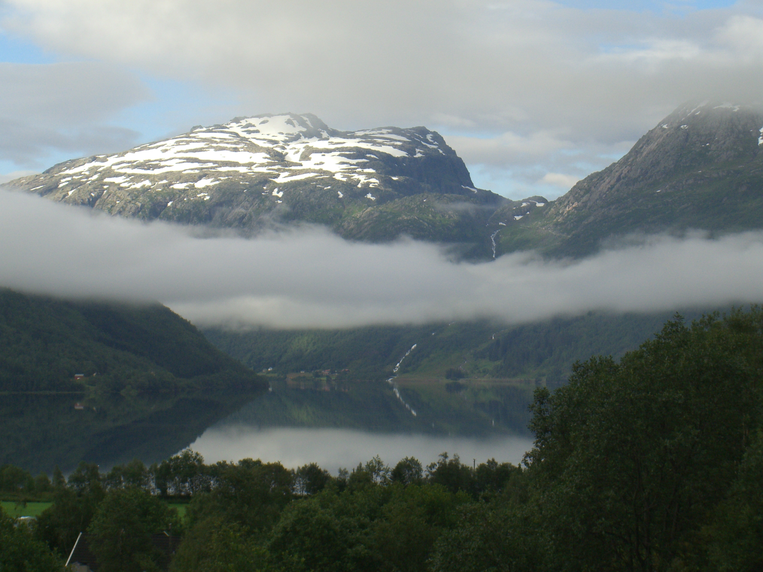 no: Røldalsvatnet